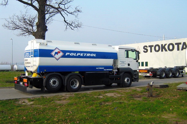 Надстройки на шасси